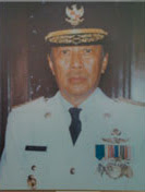 Gubernur Jawa Timur, Wahono